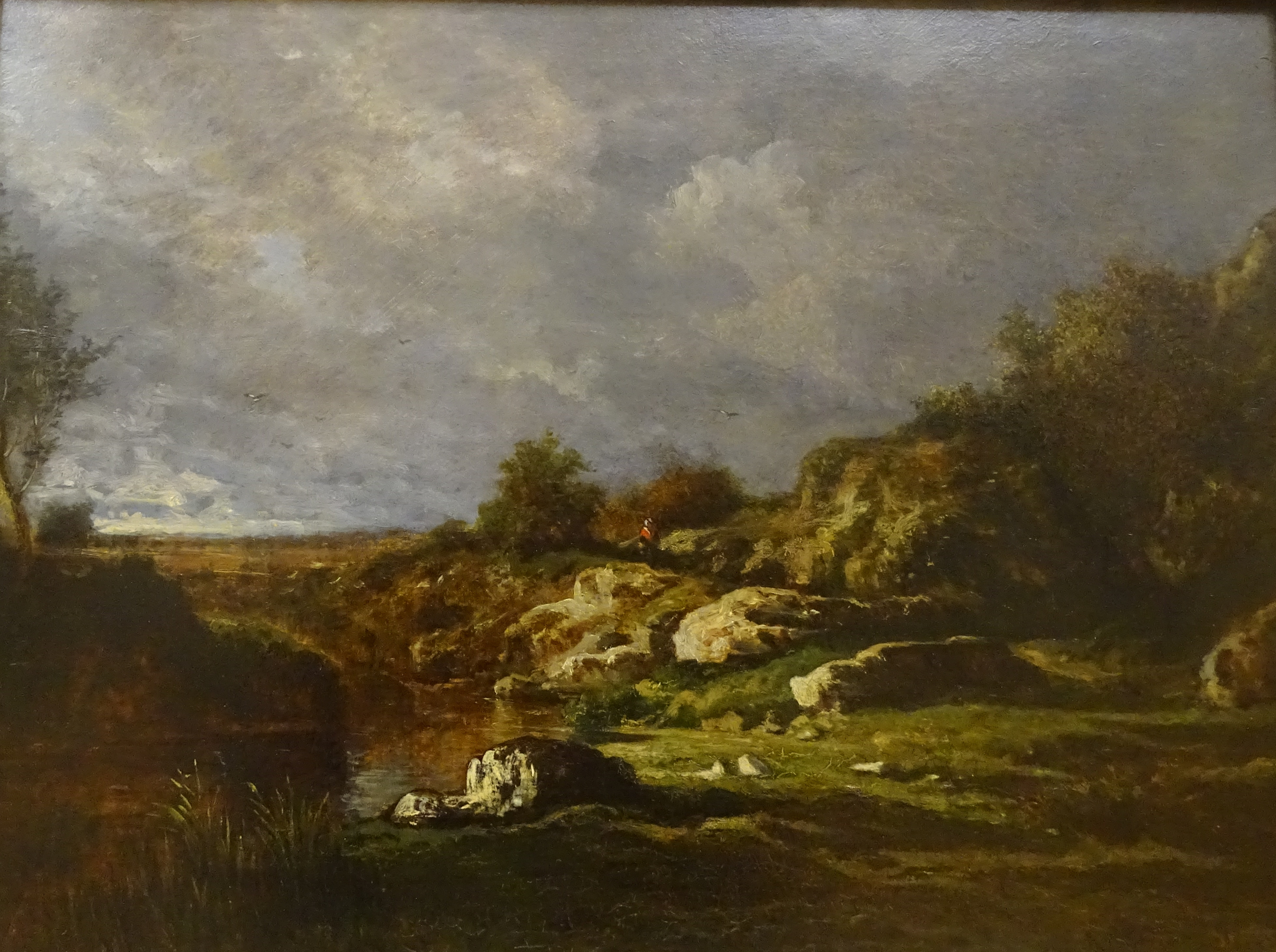 Étang de Frignon, 1856